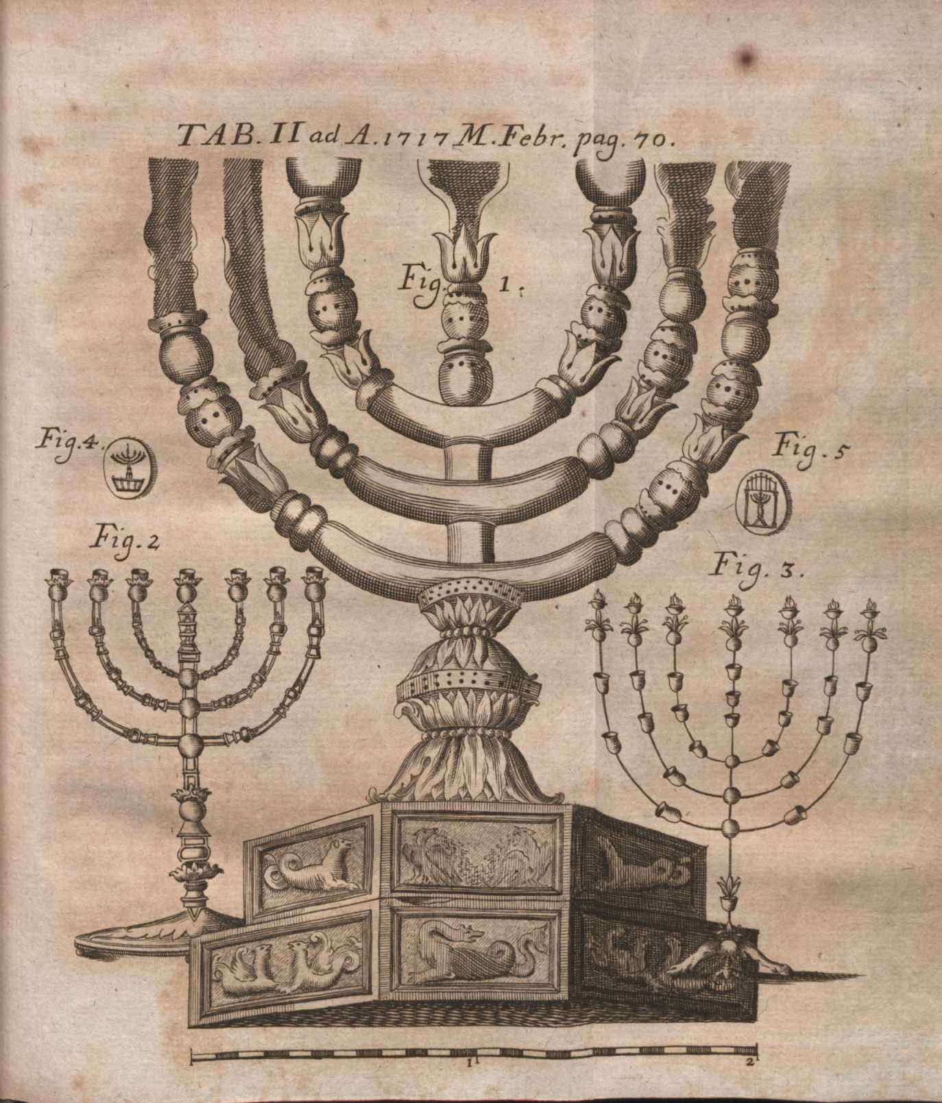 Illustration